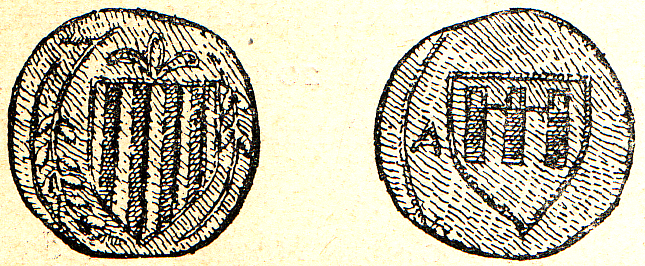 Monedes catalanes del segle XV encunyades a Talarn (Pallars Jussà)